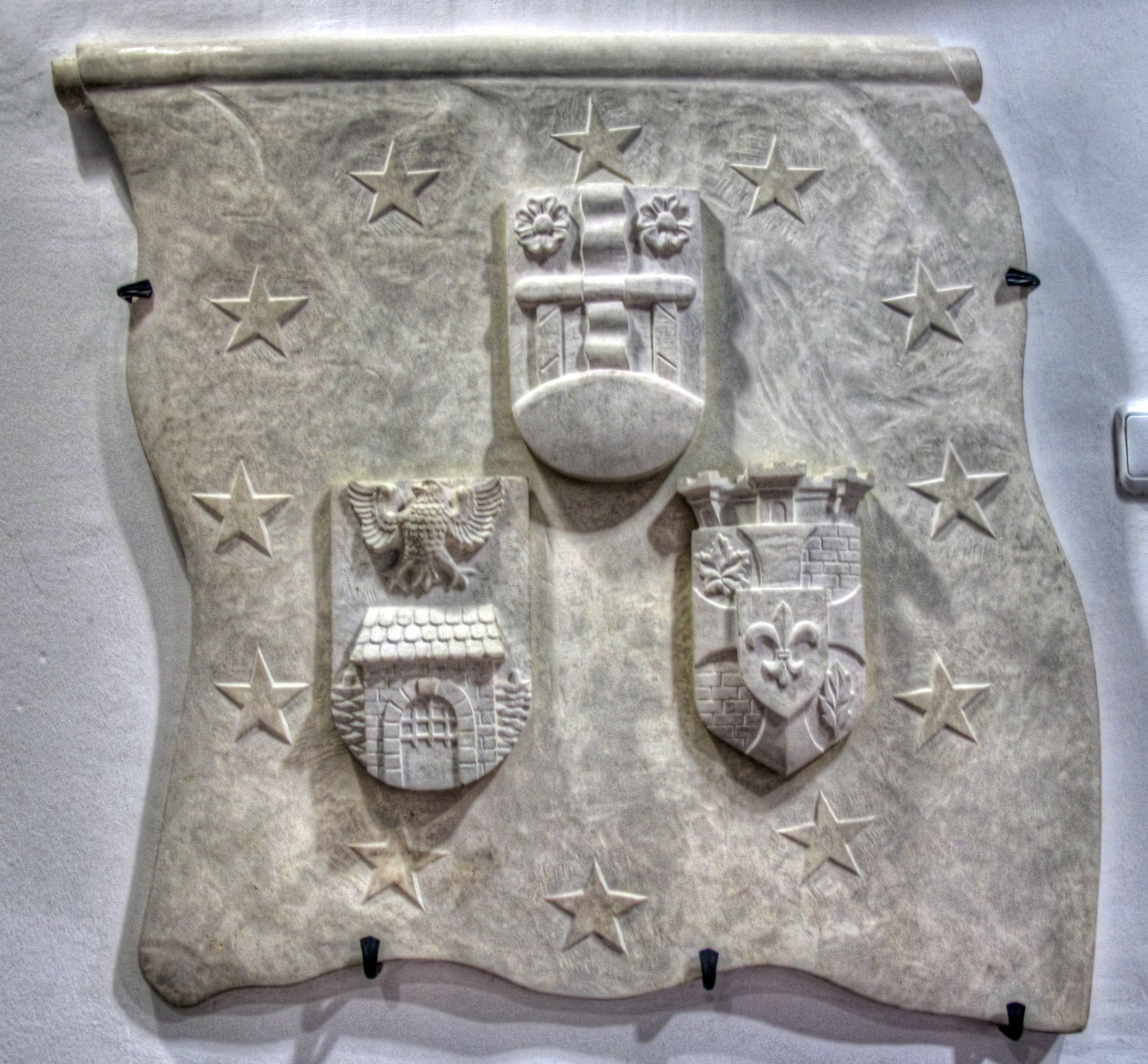 Wandskulptur mit den Wappen der Partnerstädten Gröbenzells im Bürgerhaus, ca. 1m x 1m